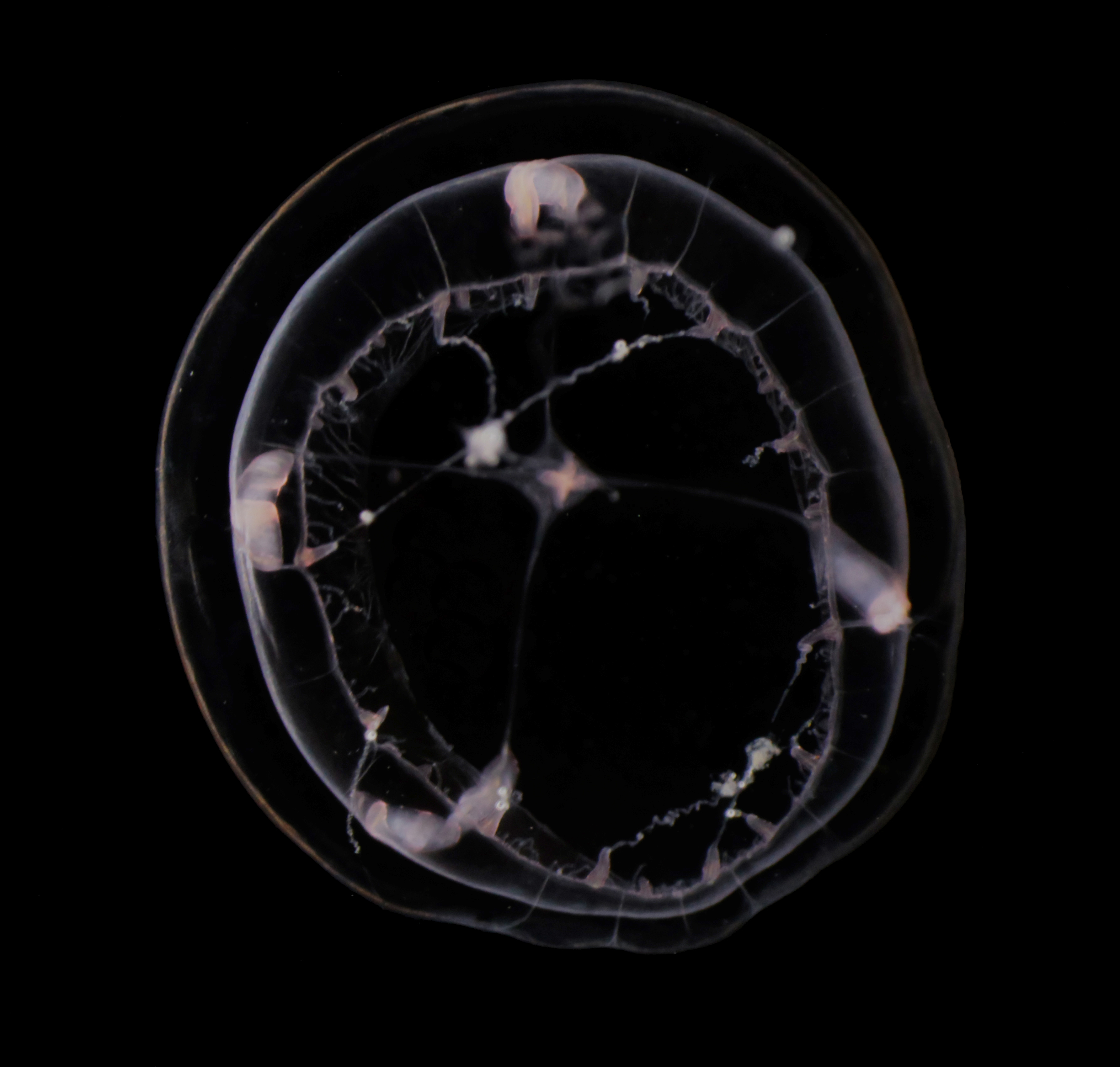 Mitrocomella polydiademata